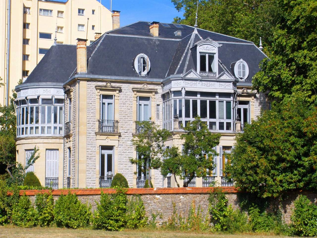 Palacio de Zulueta (Vitoria)